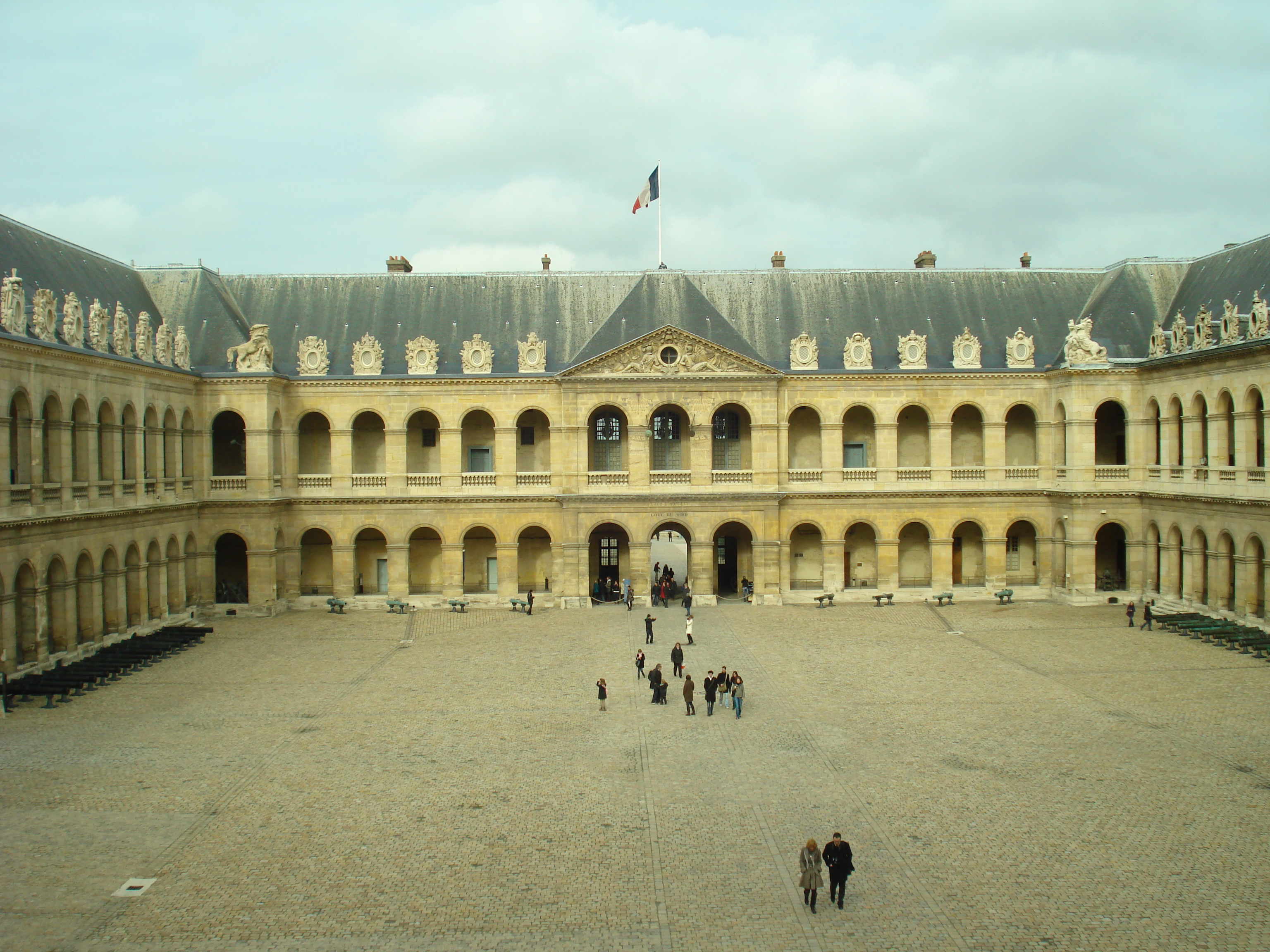 Cour du Musée de l'Armée